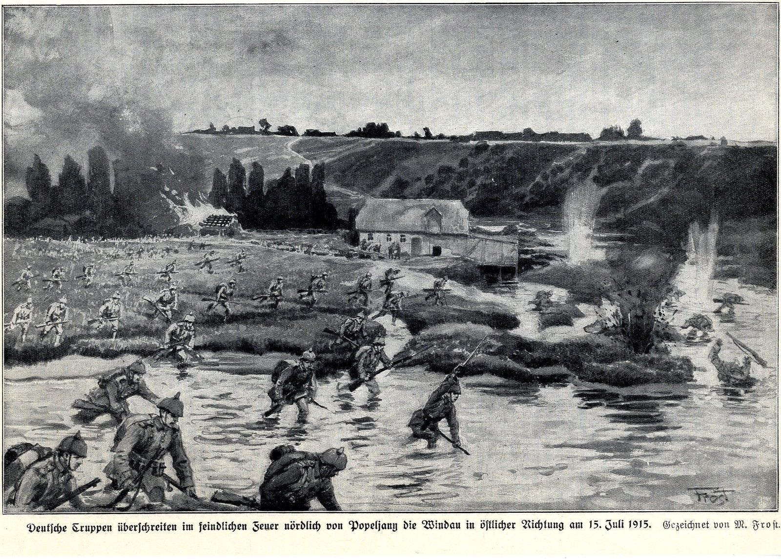 Das brennende Schaulen im Mai 1915